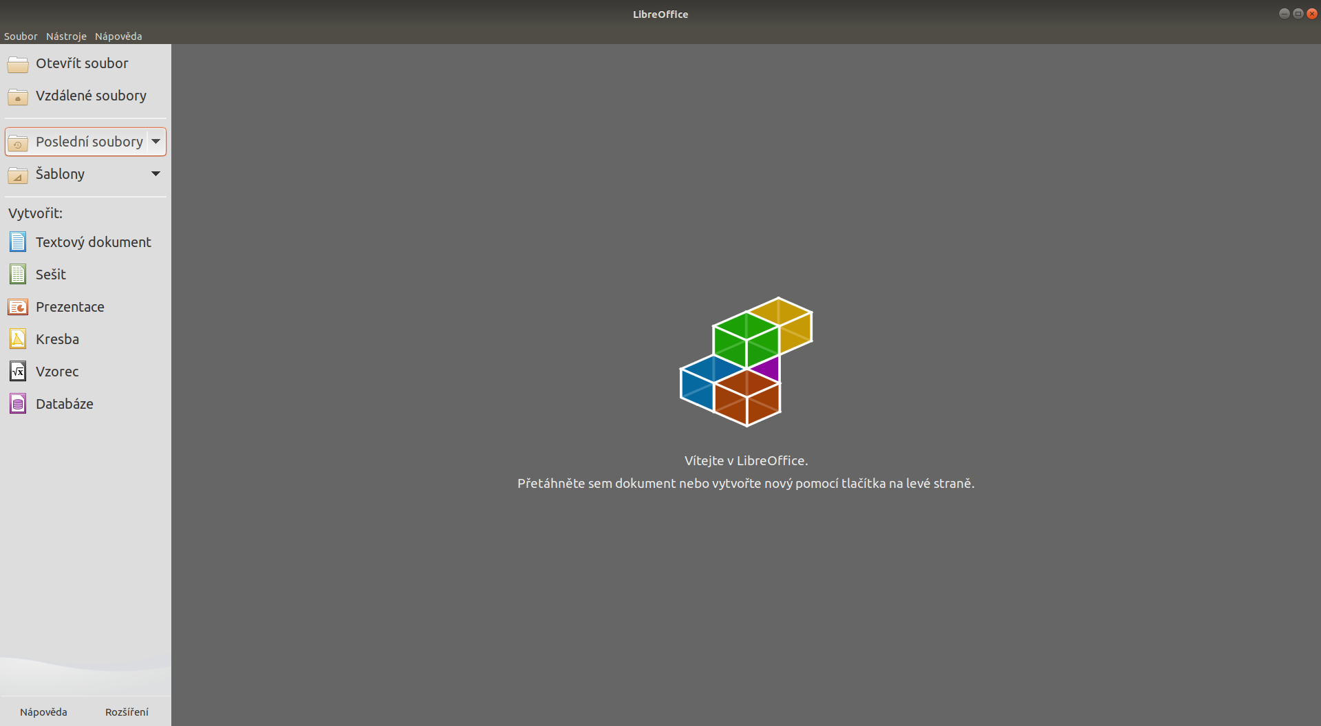 Otisk obrazovky startu programu LibreOffice verze 6.2 v operačním systému Ubuntu (v češtině)